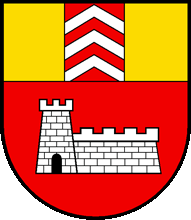 Armoiries de l'ancienne commune de Môtiers. Auteur : Gérard Crameri